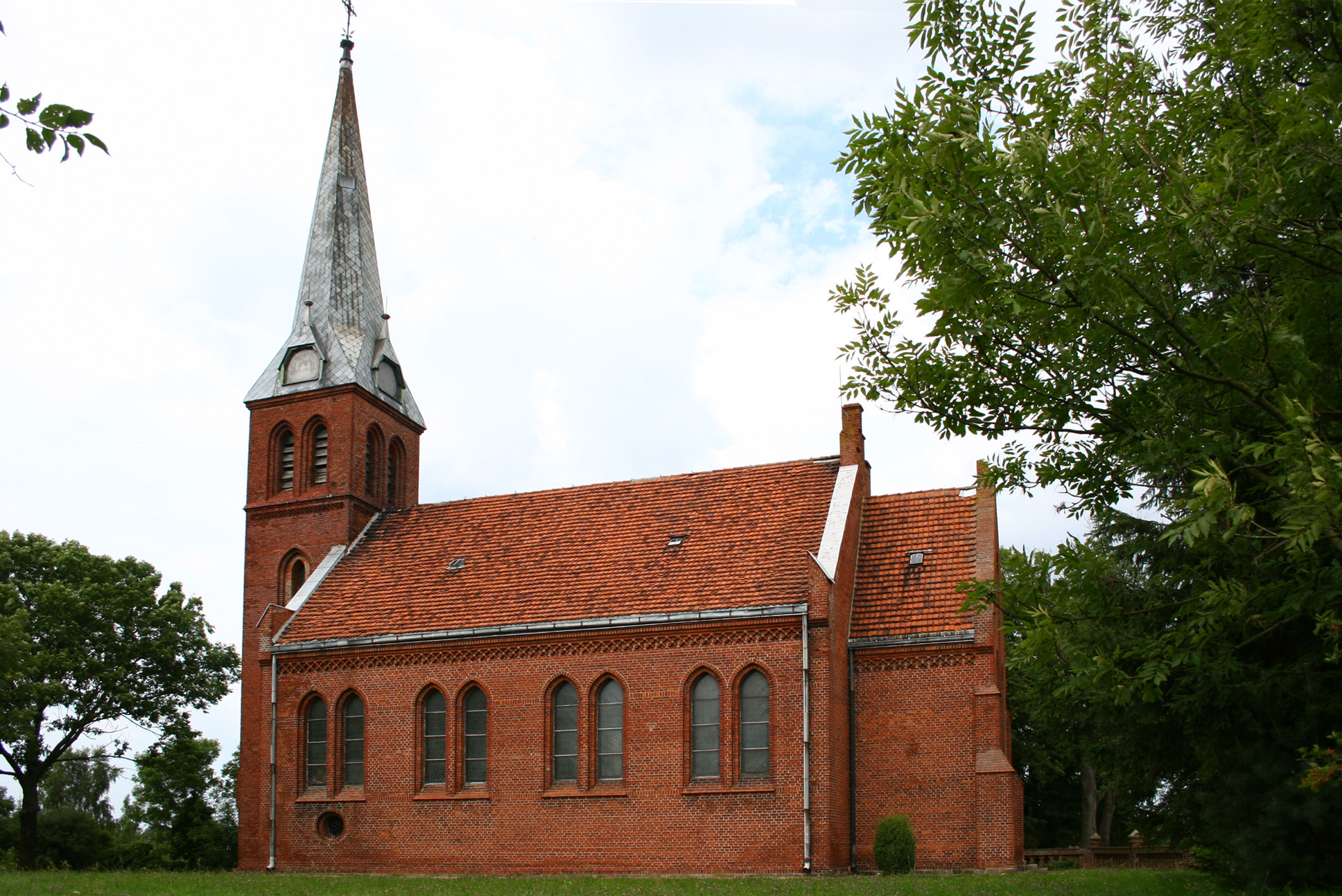 Włodarka - neogotycki, ceglany kościół filialny p.w. Podwyższenia Krzyża Świętego z XIX w.